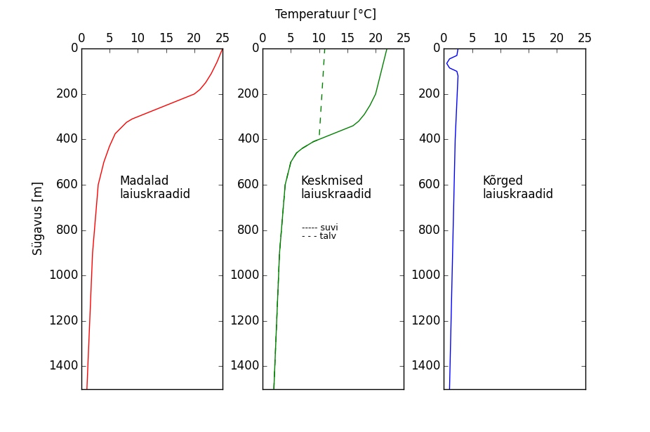 Eri laiuskraadidele vastavad tüüpilised termokliinid. Madalamatel laiuskraadidel on termokliin paksem ning üleminek epilimnioni ja hüpolimnioni vahel sujuvam. Pooluste poole liikudes muutub termokliin õhemaks või kaob üldse.